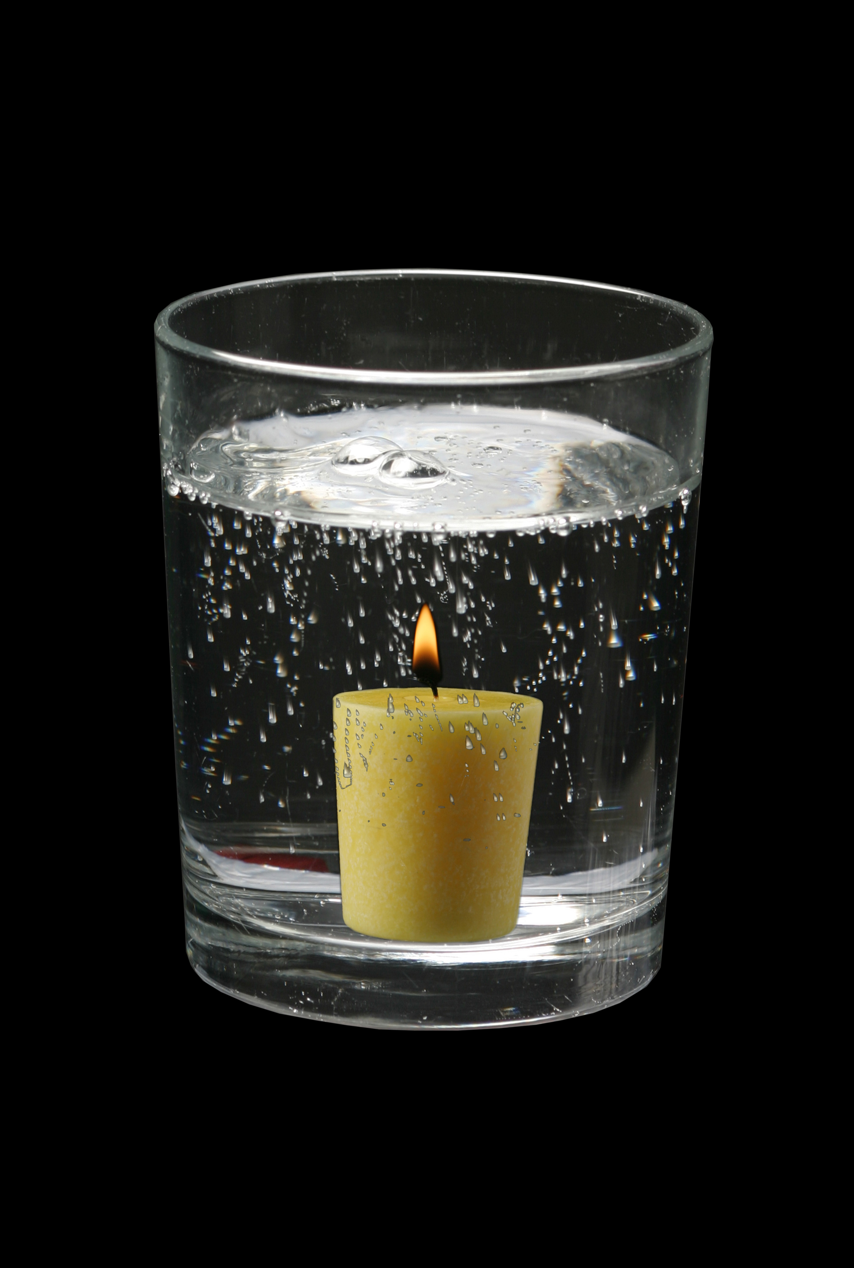 Fotomontage "Kerze in Bild", bearbeitet mit Photoshop CS